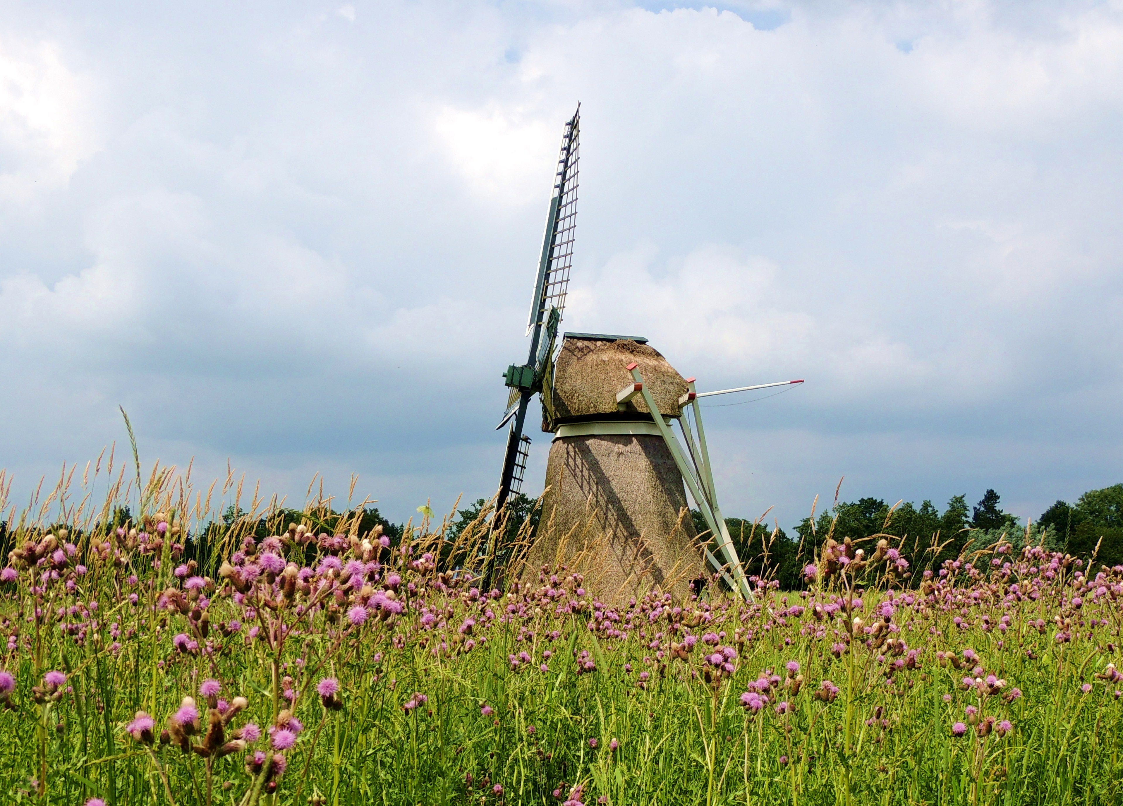 De Mûnts poldermolen